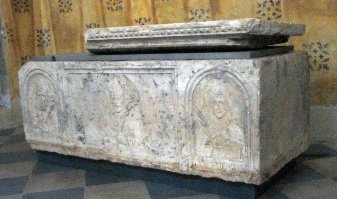 Arca di san Paterio (Museo di Santa Giulia, Brescia)